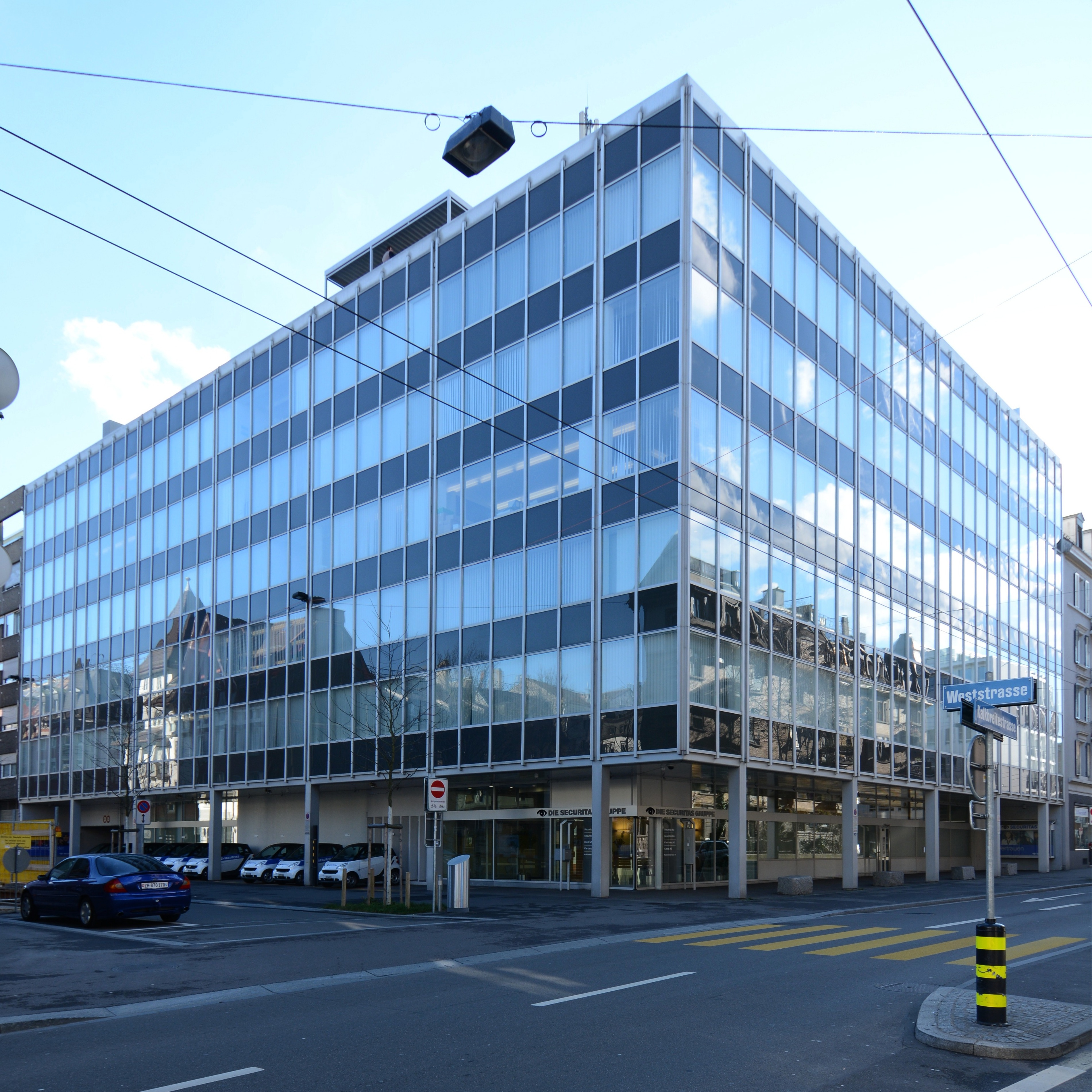 BP-Hauptsitz, Zürich, 1969. Architekt: Werner Gantenbein